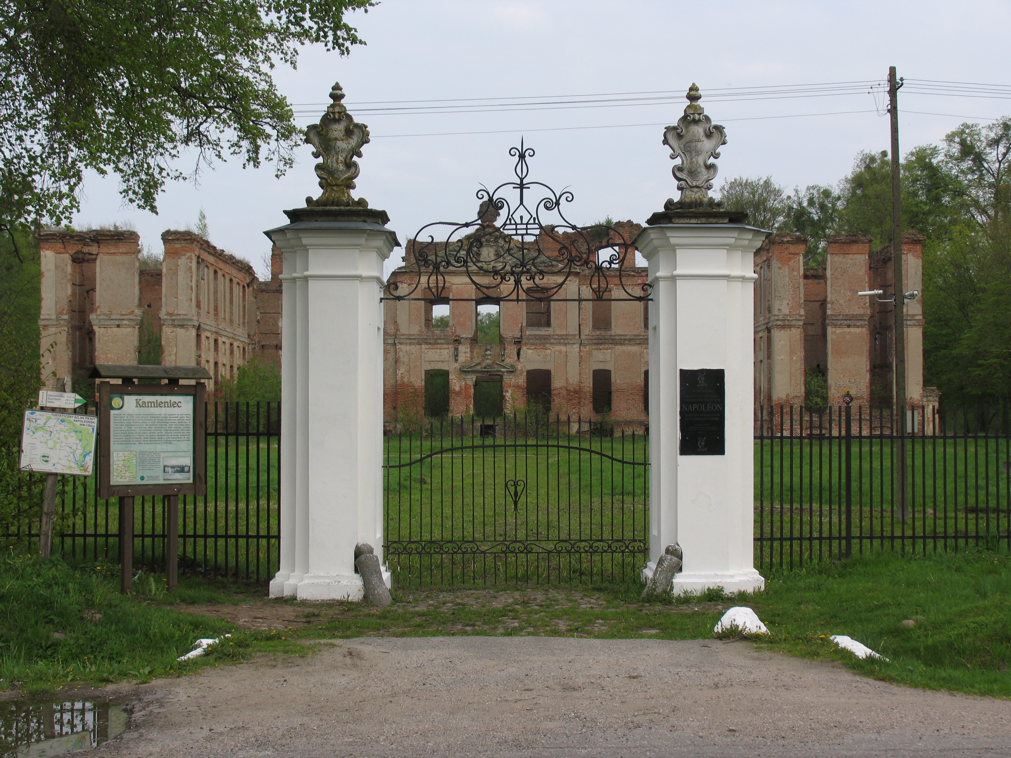 Kamieniec, główna brama wjazdowa